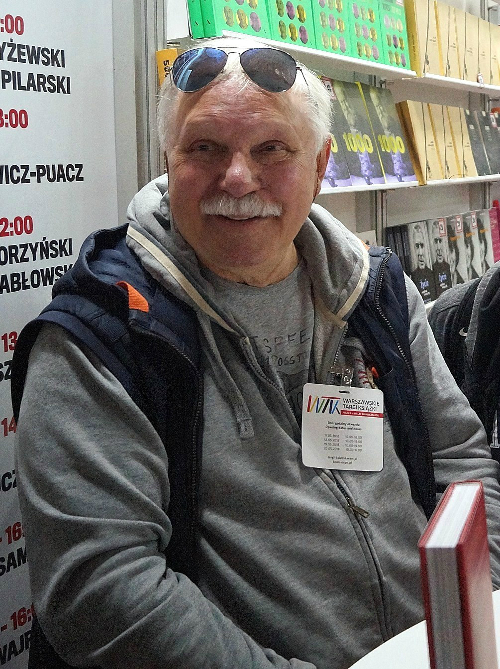 Andrzej Korzyński, kompozytor (m.in. muzyki filmowej). Warszawskie Targi Książki 2018.